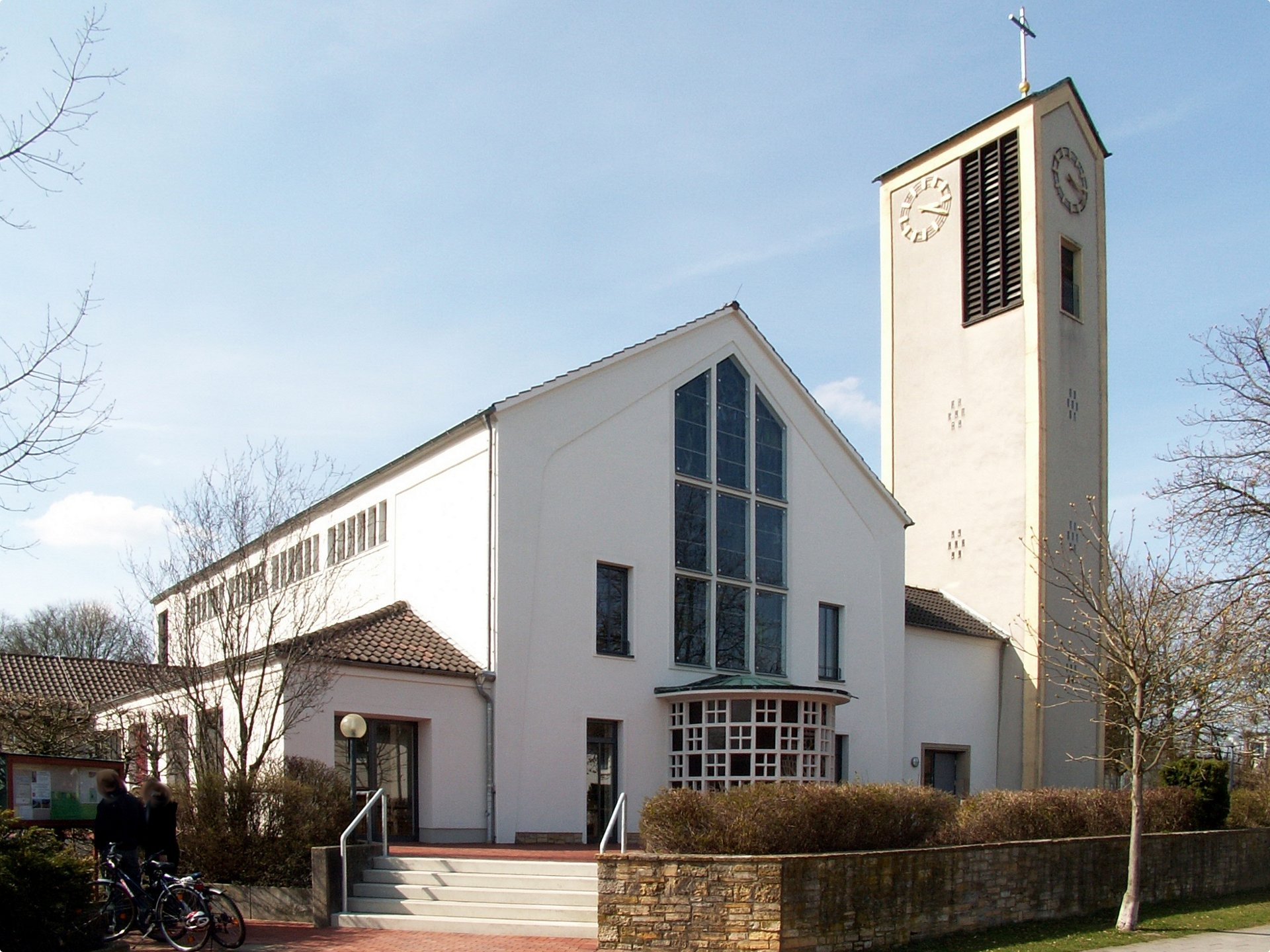 kath. Kirche St. Pius in Osnabrück, Stadtteil Kalkhügel, Ansicht von Südosten